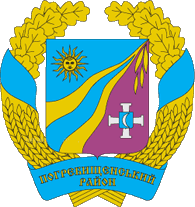 Герб Погребищенського району